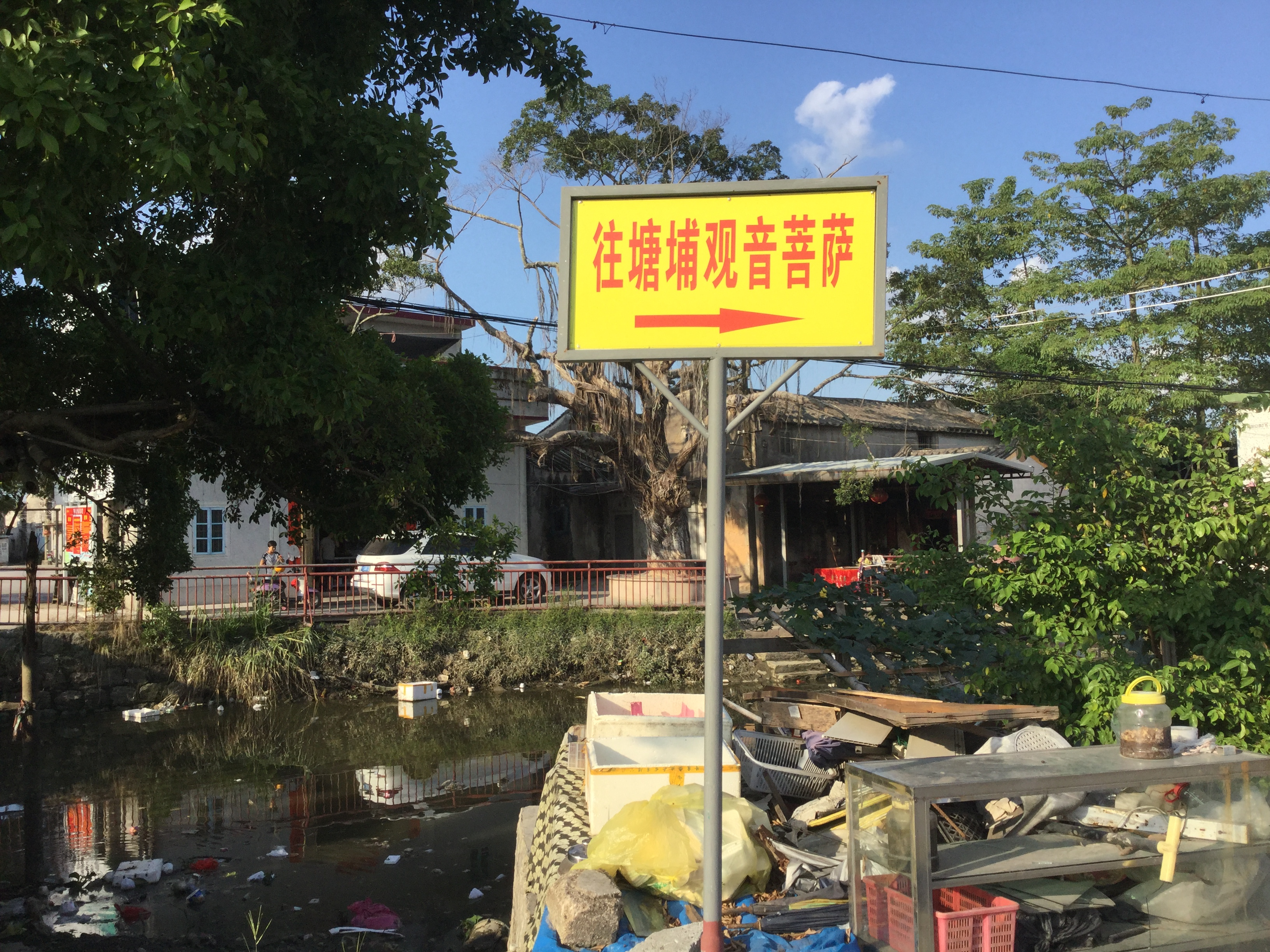 塘埔村“往塘埔观音菩萨”的黄色路牌